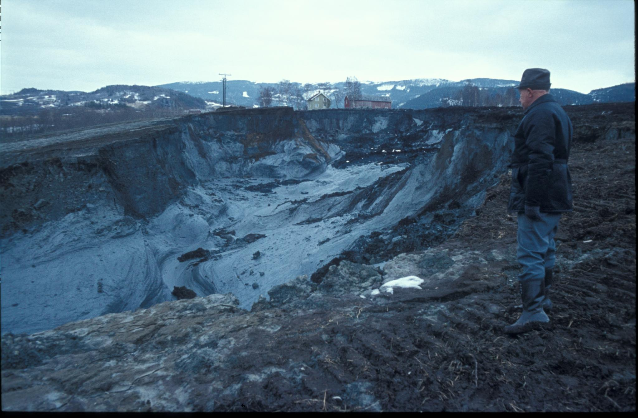 Leirras i Stjørdal. Hydrologisk arkiv. Dato: 1976-04-20